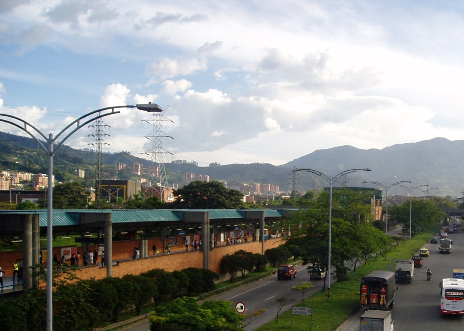 Estación Ayurá (Metro de Medellín)